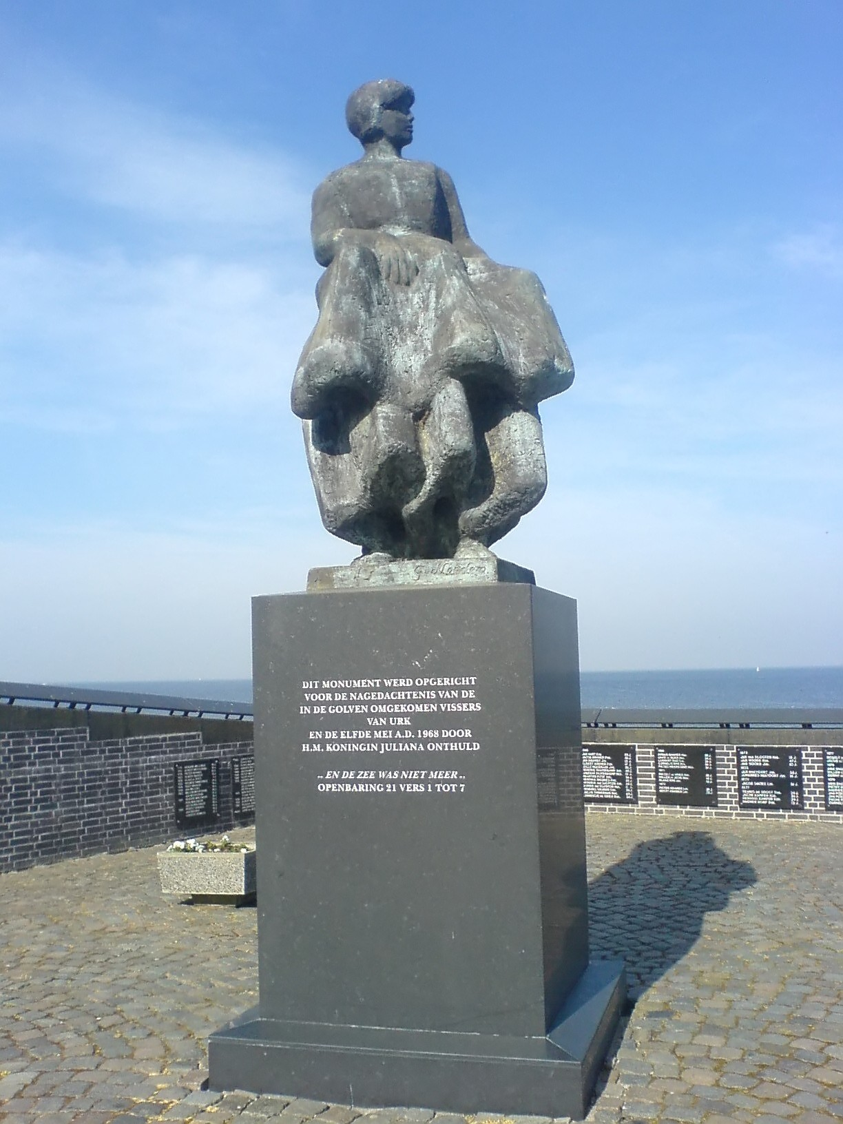 Urker Vissersmonument (1968) by G. van der Leeden in Urk/The Netherlands